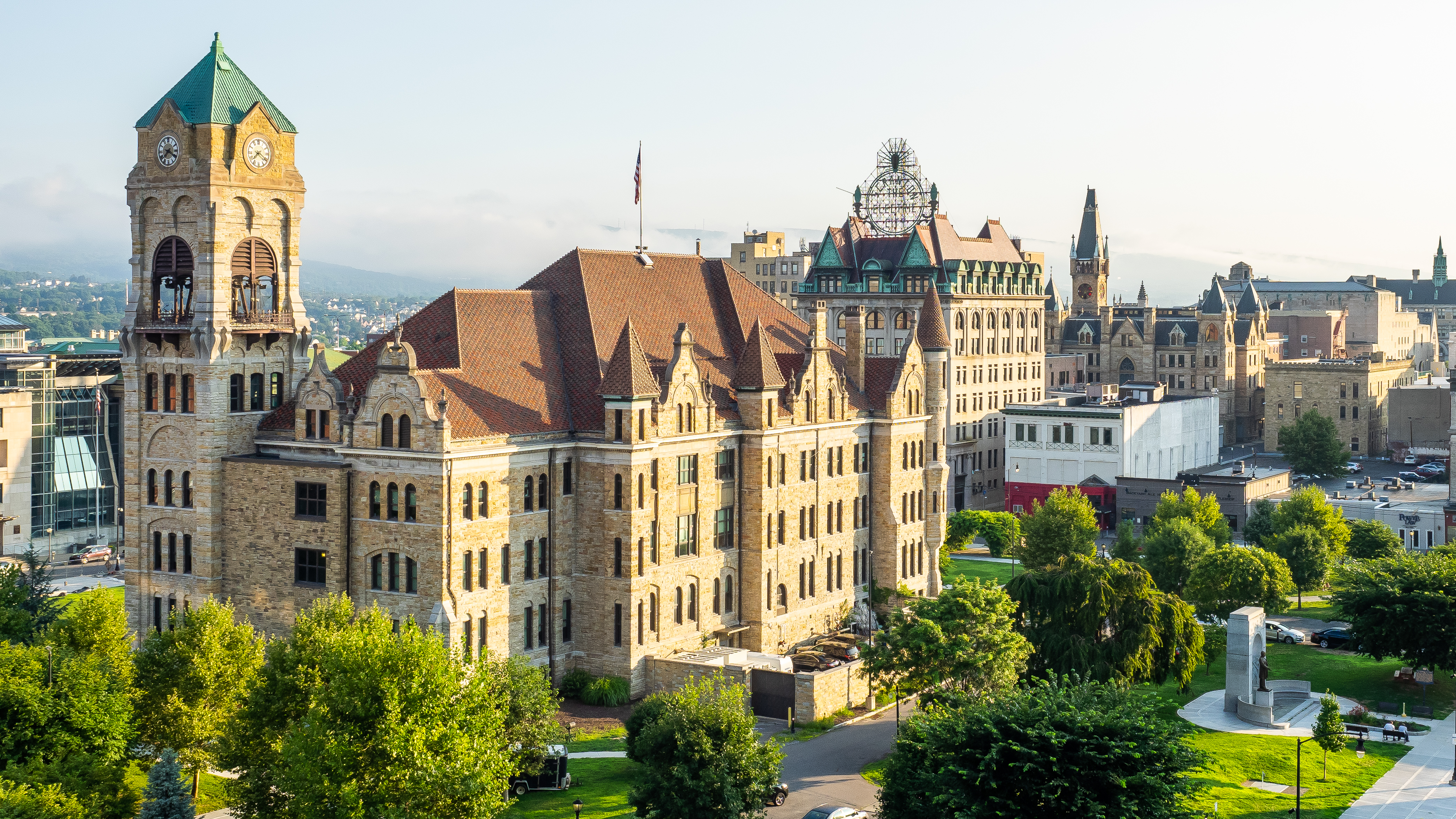 Scranton, PA